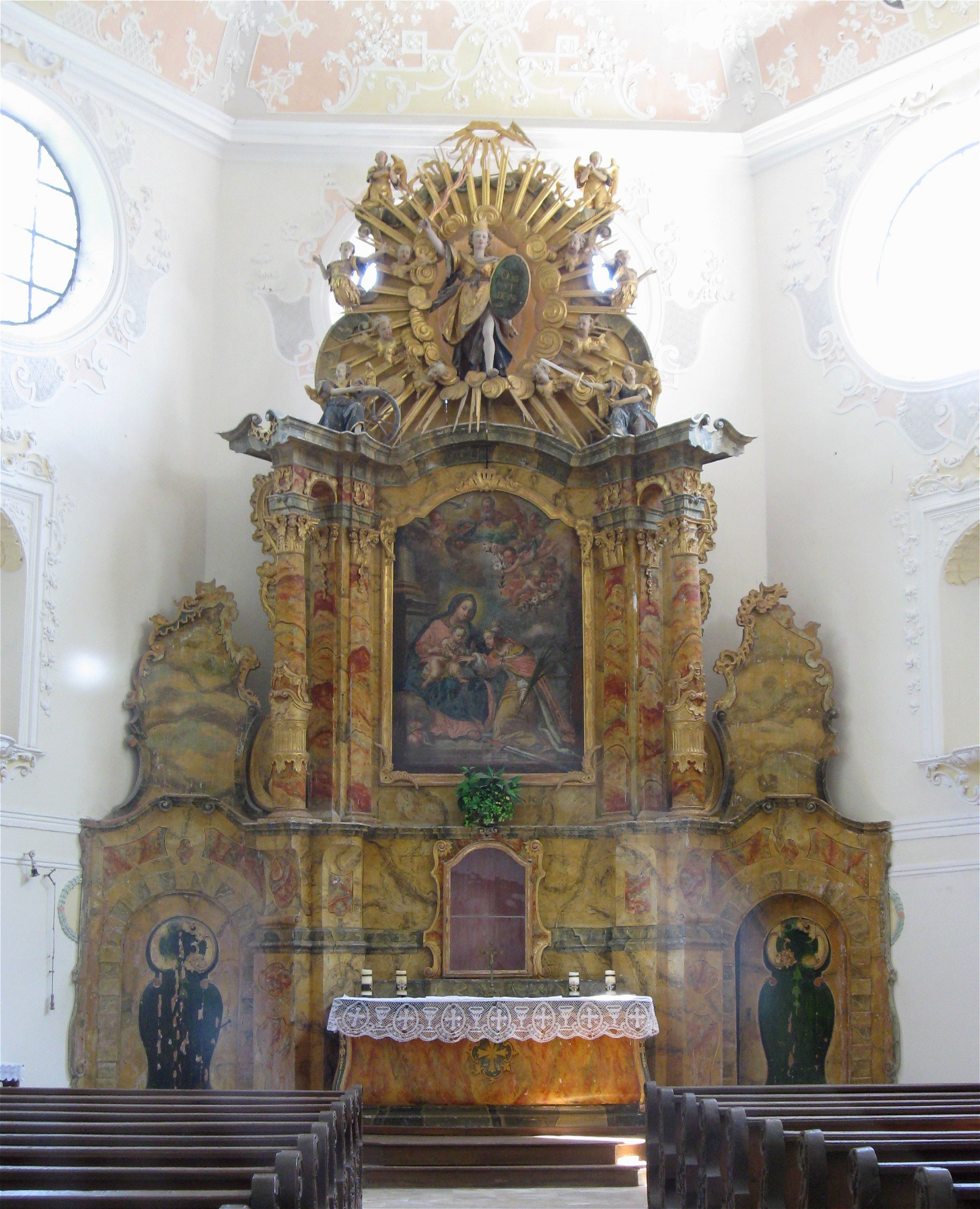 Memminger Straße 42; Katholische Kapelle St. Katharina achteckiger Zentralbau mit Dachreiter, mit Verbindungsbau zum anschließenden ehem. Mesnerhaus, 1606/07, Umgestaltung 1. Hälfte 18. Jahrhundert; mit Ausstattung. D-7-78-173-115